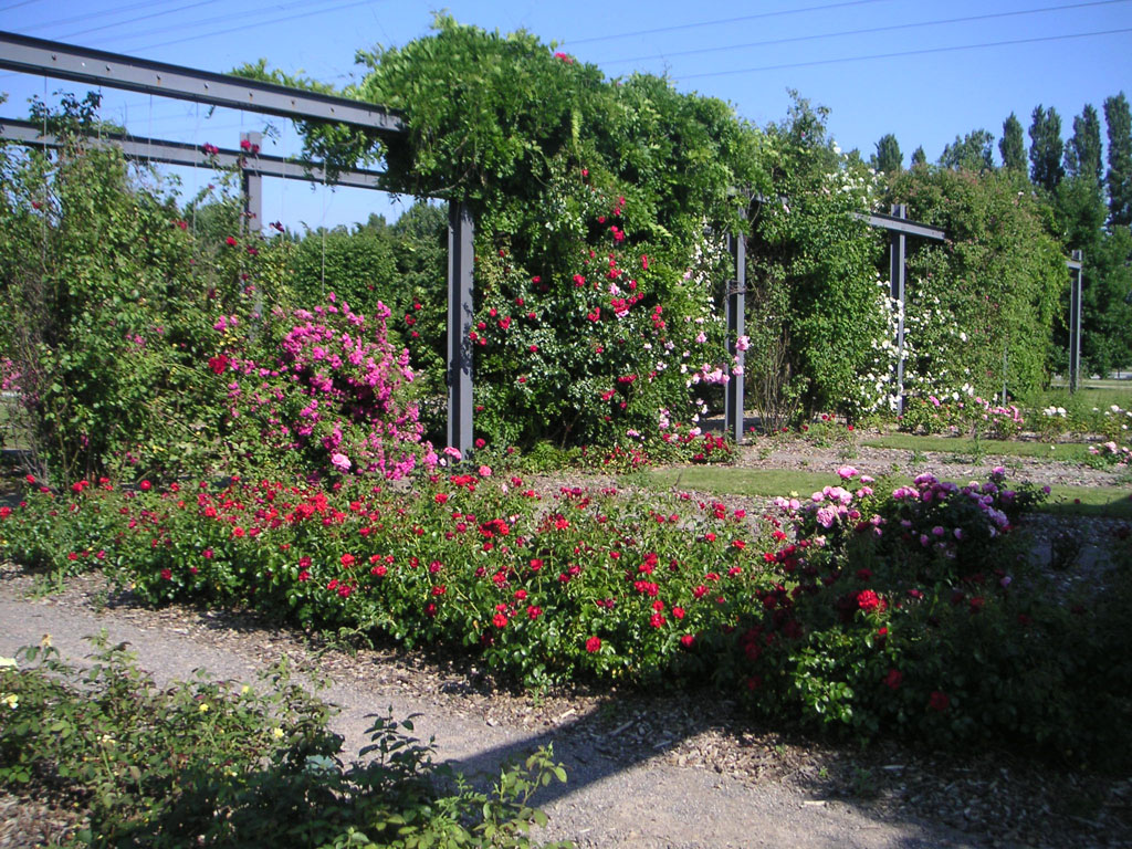 Beschreibung: Rosen und andere Gewächse im Nordsternpark Gelsenkirchen Description: Roses and other plants in the Nordsternpark Gelsenkirchen Quelle: Fotografiert am 23 Juni 2005 Fotograf: Marc Schuelper